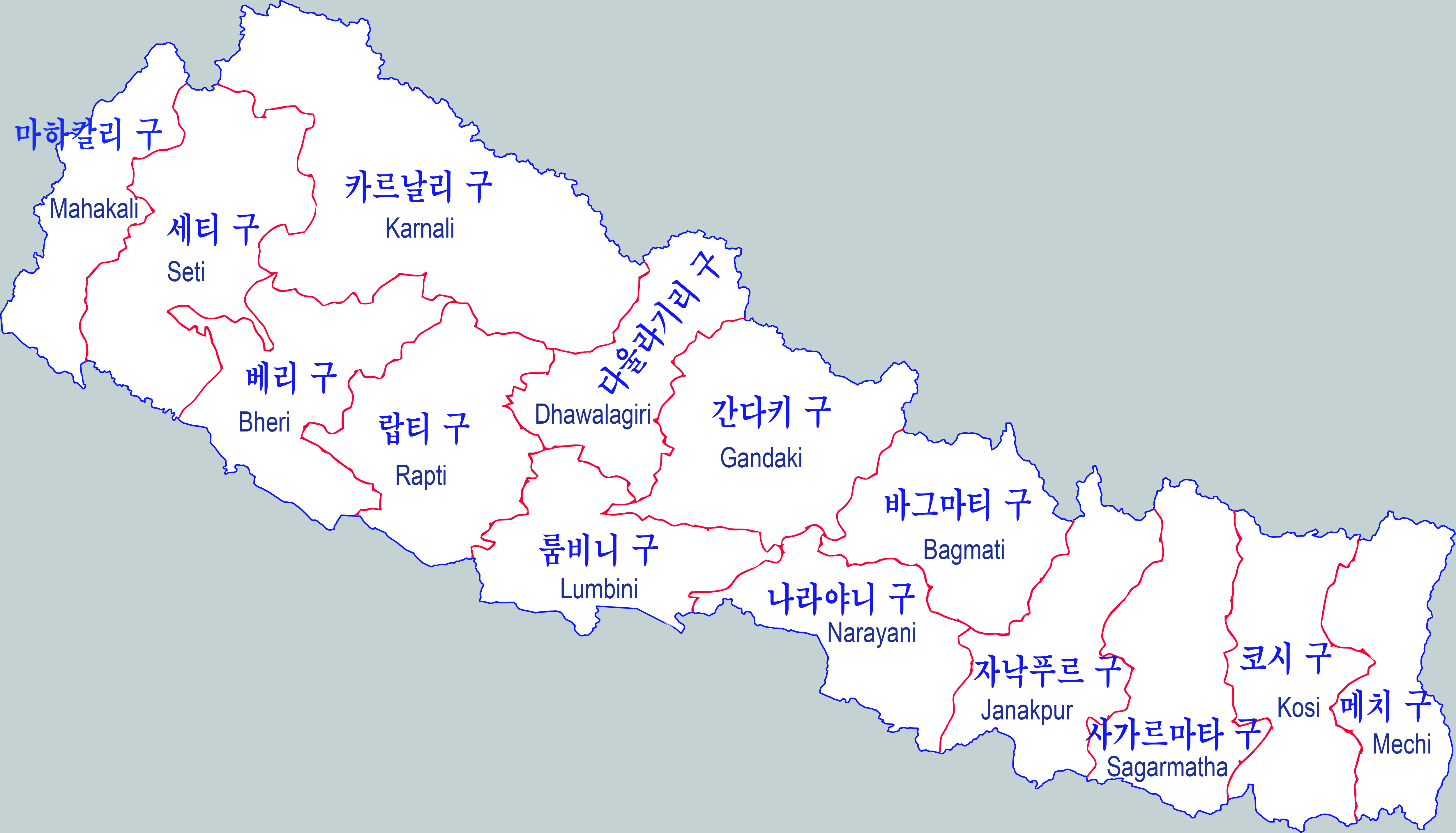 네팔 행정구역